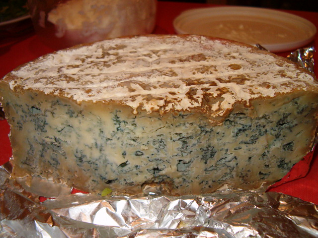 Fromage de chèvre espagnol, photo personnel Eric Daghé, Lausanne.